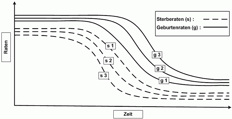 Grafik: Variables Modell des Demograhischen Uebergangs. Eigene Grafik, erstellt am 16.03.2004. Farbtiefe: 16 (4 BitsPerPixel) Bildgroesse: 800 x 410 Pixels (B x H) Beschriftungen: deutsch Dateiformat: PNG Dateigroesse: 12.12 KB (12415 Bytes)